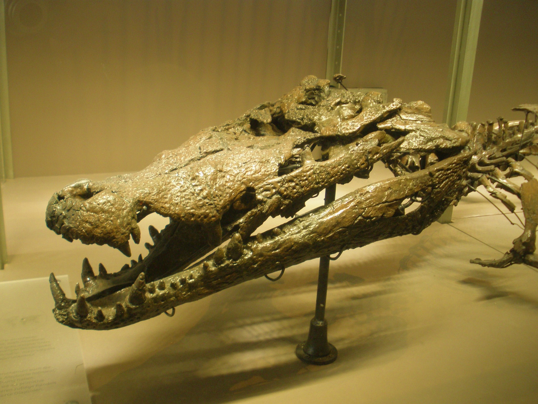 Fossil of Asiatosuchus or Crocodylus depressifrons, an extinct crocodile Took the photo at Musee d'Histoire Naturelle, Brussels